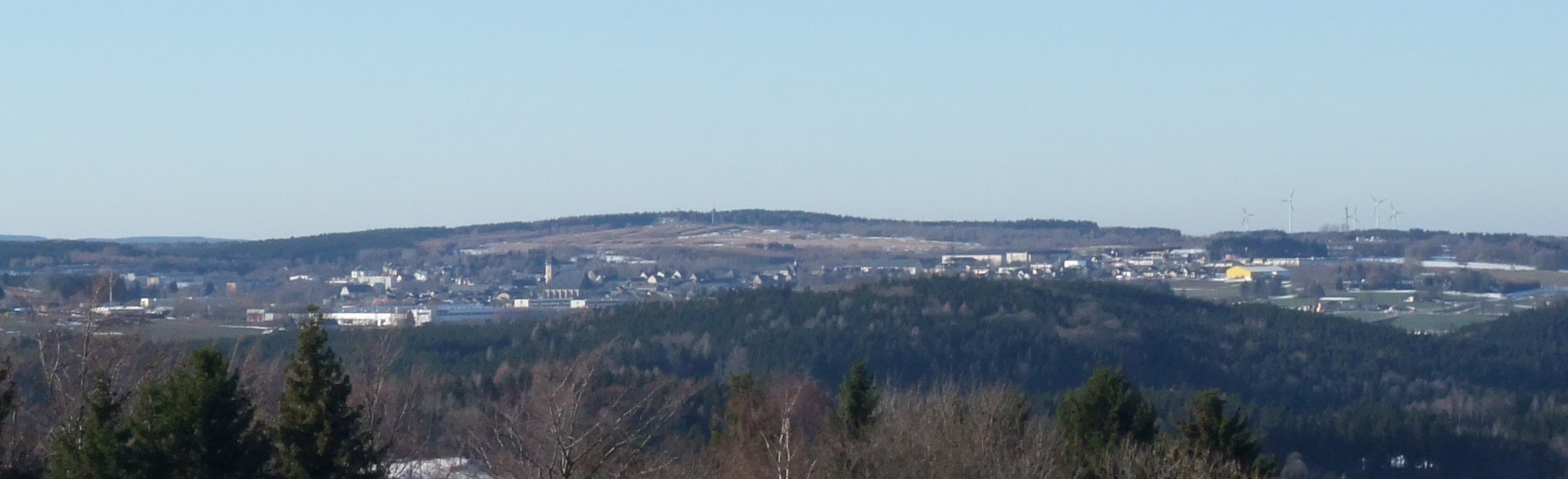 Marienberg von Ansprung aus gesehen.